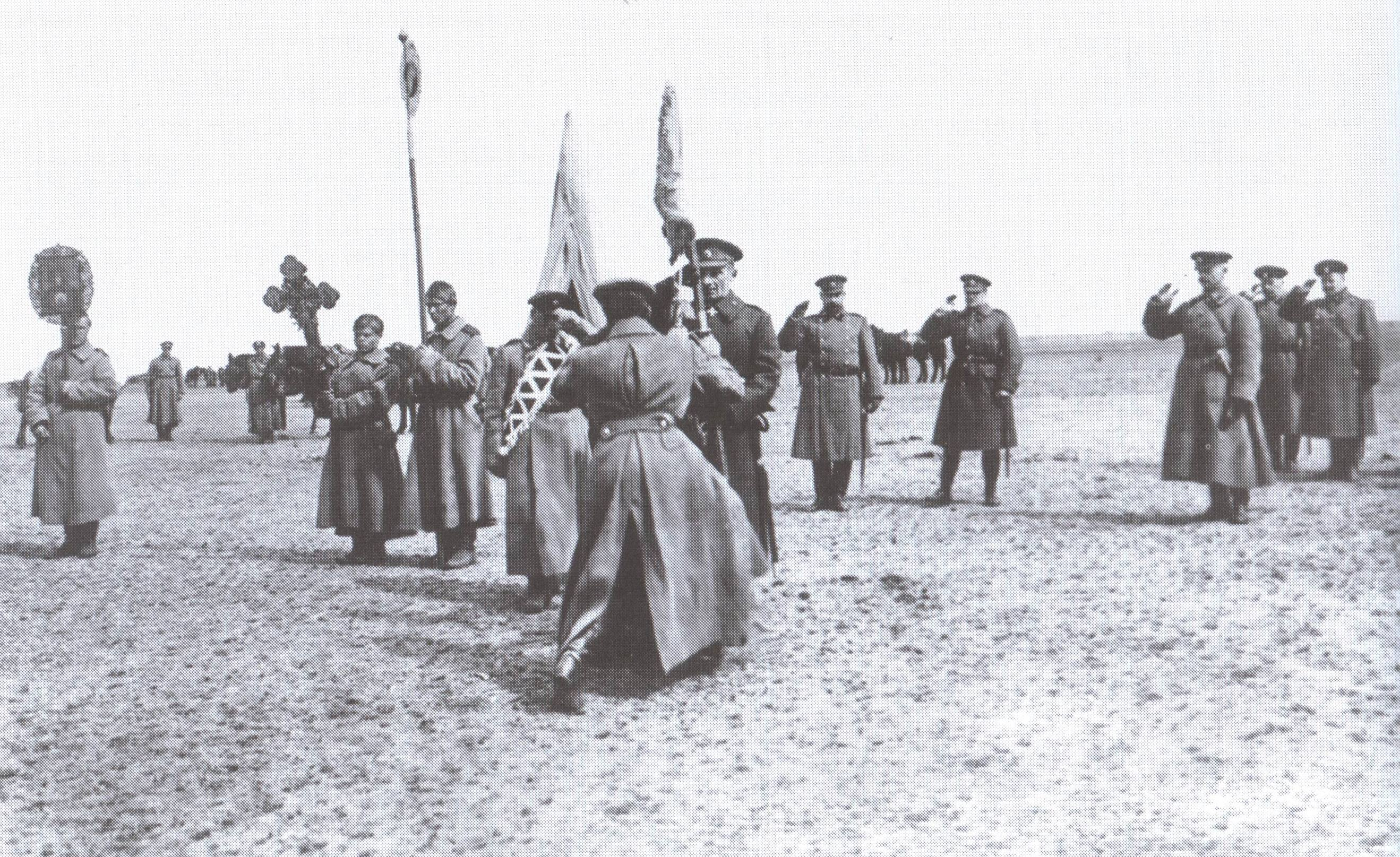 Верховный правитель вручает полковое знамя. 1919 г.